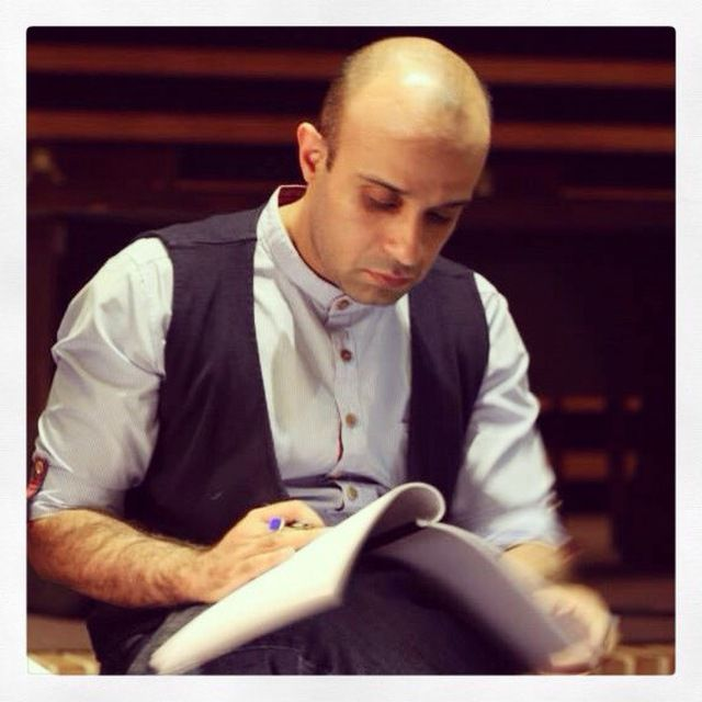 مانی جعفرزاده (موسیقیدان) تالار رودکی دی ۱۳۹۲